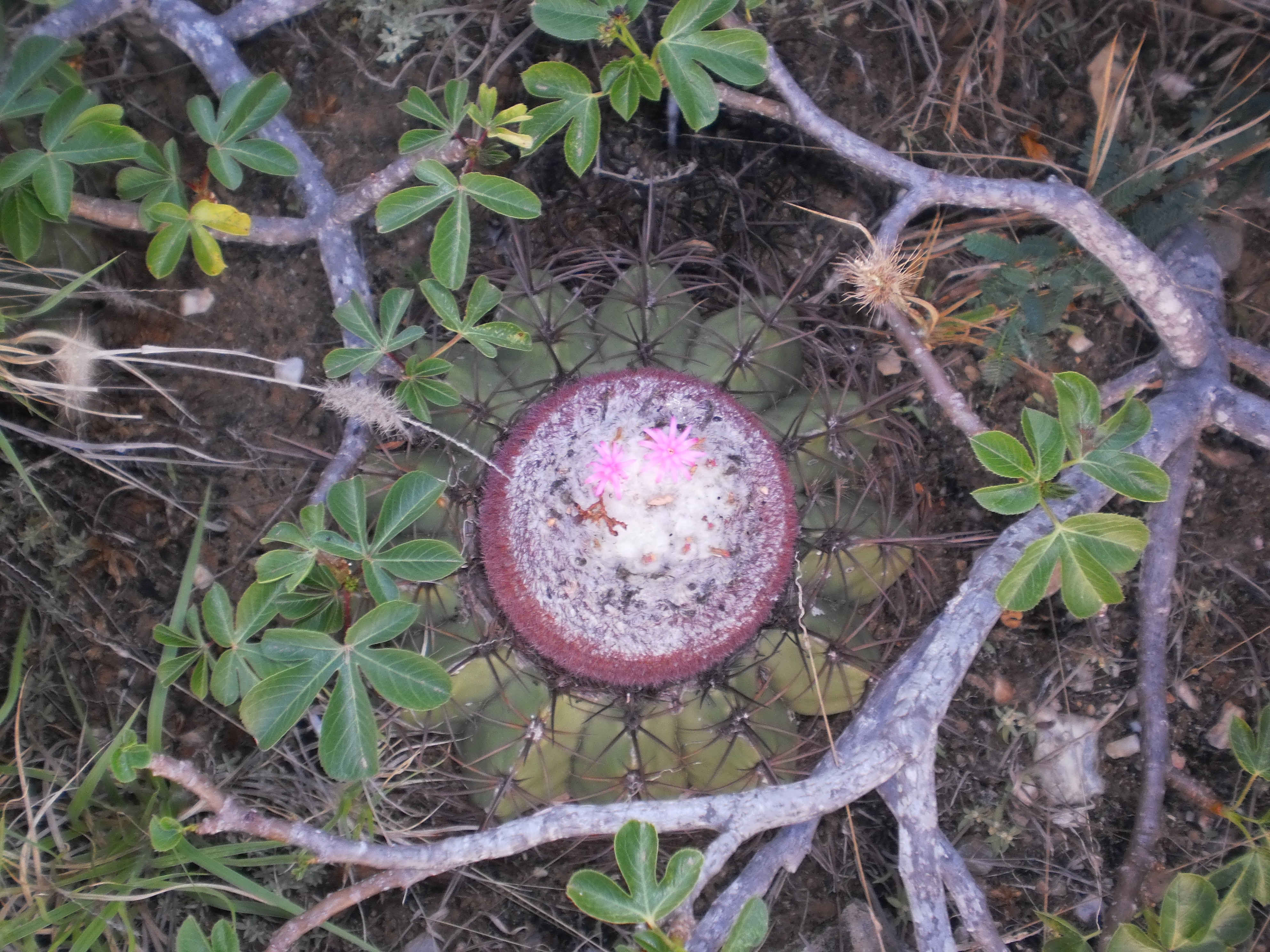 Melón de monte vía de la Restinga